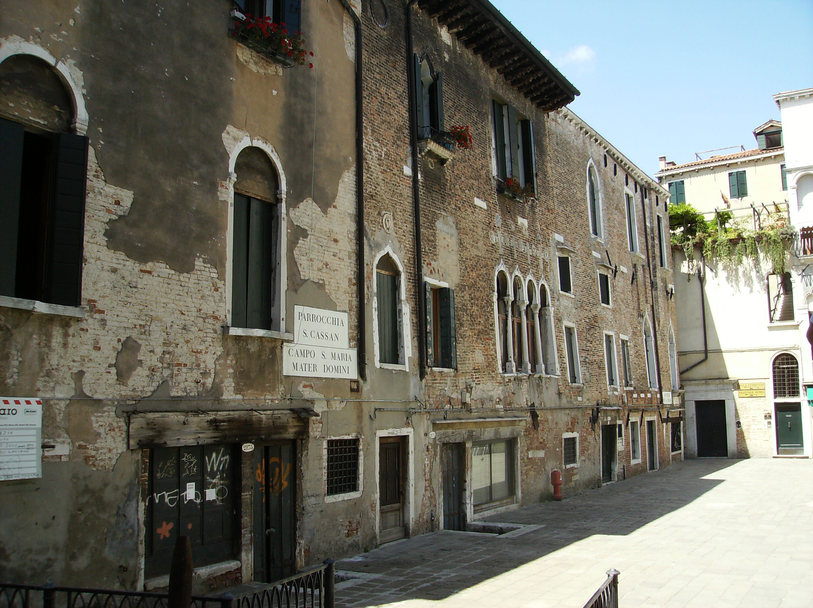 campo s maria mater domini venise